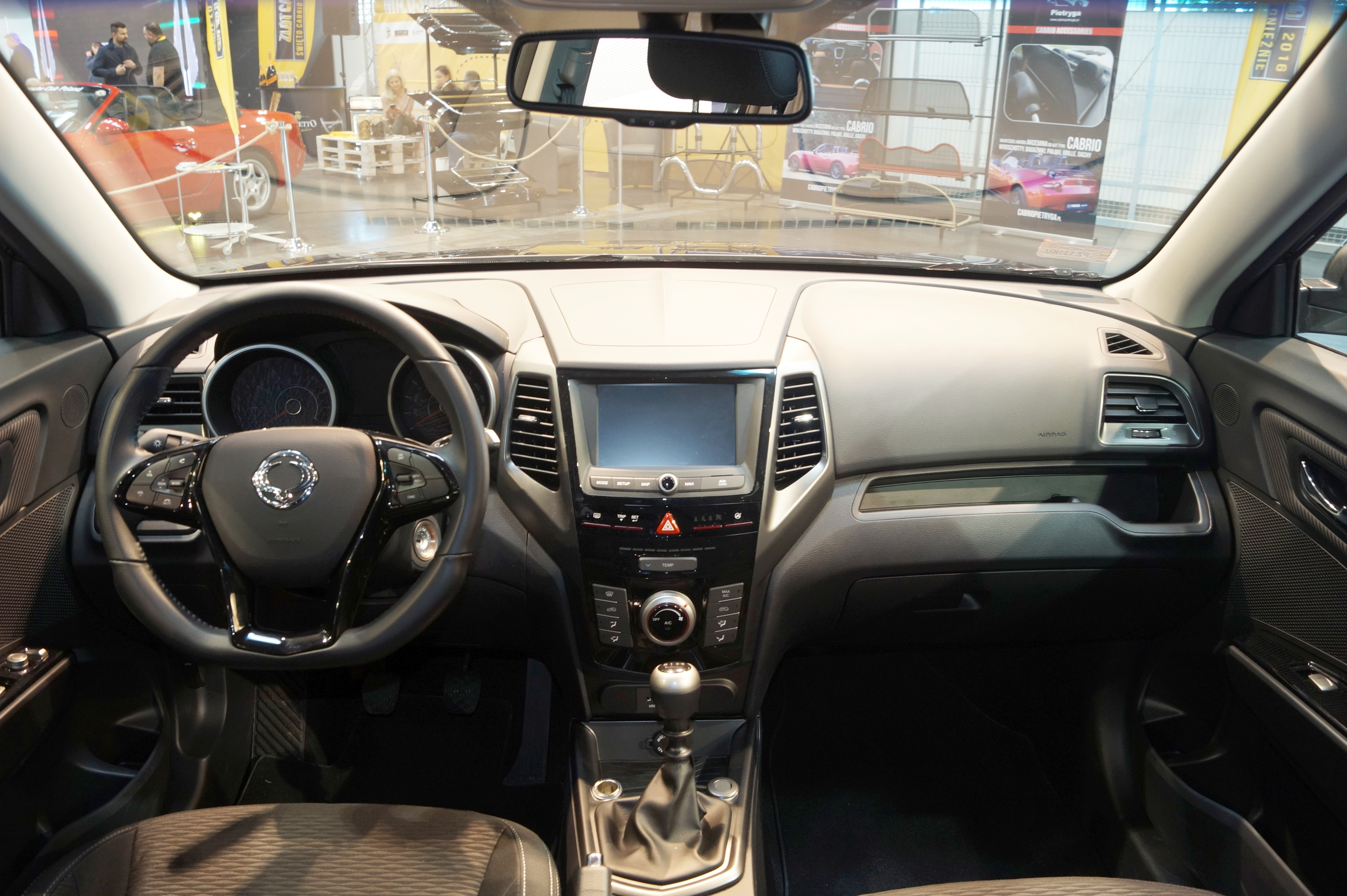 Wnętrze SsangYonga XLV na Motor Show Poznań 2017.